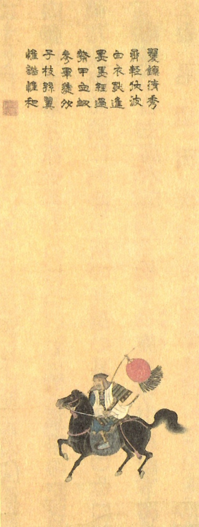 高木清秀の肖像。